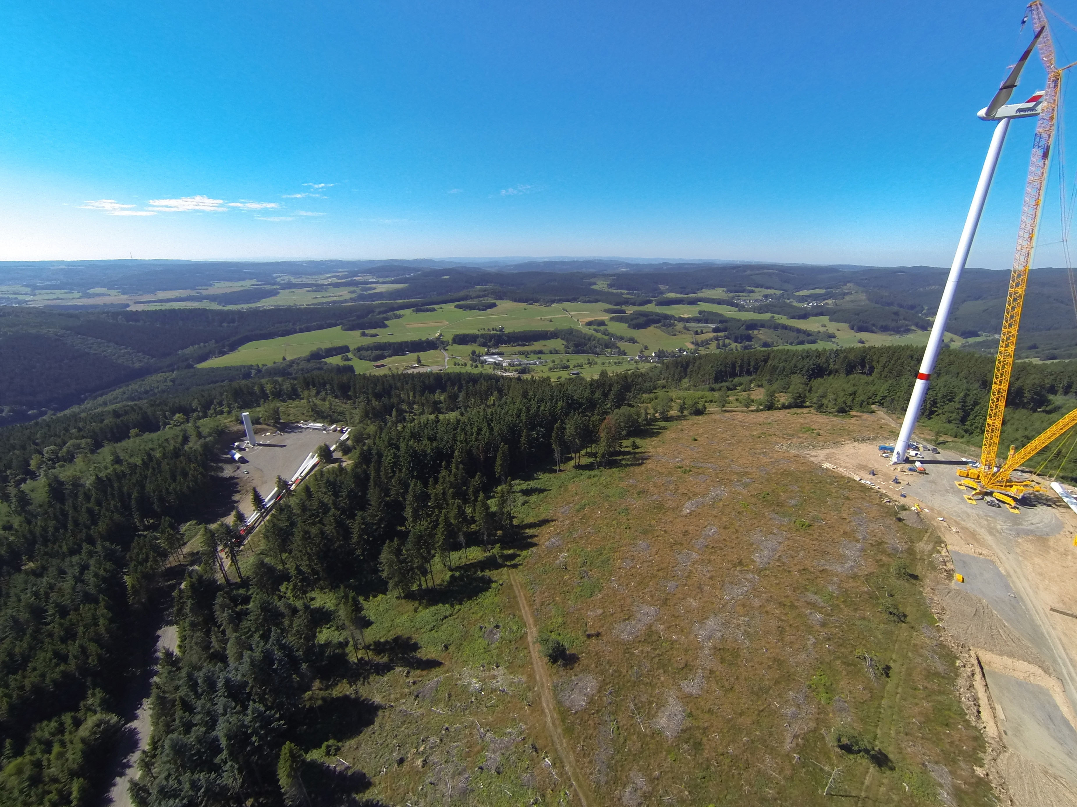 15. Station seiner Zukunftsenergientour: Windpark-Eröffnung in Bad Laasphe Auf der 15. Station seiner Zukunftsenergientour eröffnete NRW-Klimaschutzminister Johannes Remmel heute (11. September 2013) mit einer Delegation der EnergieAgentur.NRW den Windpark Hesselbach, der im Privatwald von Ludwig Prinz zu Sayn-Wittgenstein-Berleburg entsteht. Die sechs Windkraftanlagen mit einer Leistung von insgesamt 18 MW wurden von der wittgenstein new energy holding GmbH finanziert, geplant und umgesetzt. Der Park könnte den jährlichen Strombedarf der Stadt Bad Laasphe (14.000 Einwohner) vollständig decken.Das Beispiel zeigt: Moderne Windenergieanlagen können wirtschaftlich in Wäldern betrieben werden, weil sie mit einer Nabenhöhe von 140 Metern die windreichen und turbulenzarmen Zonen über den Wipfeln technisch nutzbar machen. Flickr tags: NRW; Klimaschutz-Minister Johannes Remmel; 2013; Klimaschutztour; Bad Laasphe; wittgenstein new energy holding GmbH; Windkraft; Windpark; erneuerbare Energien